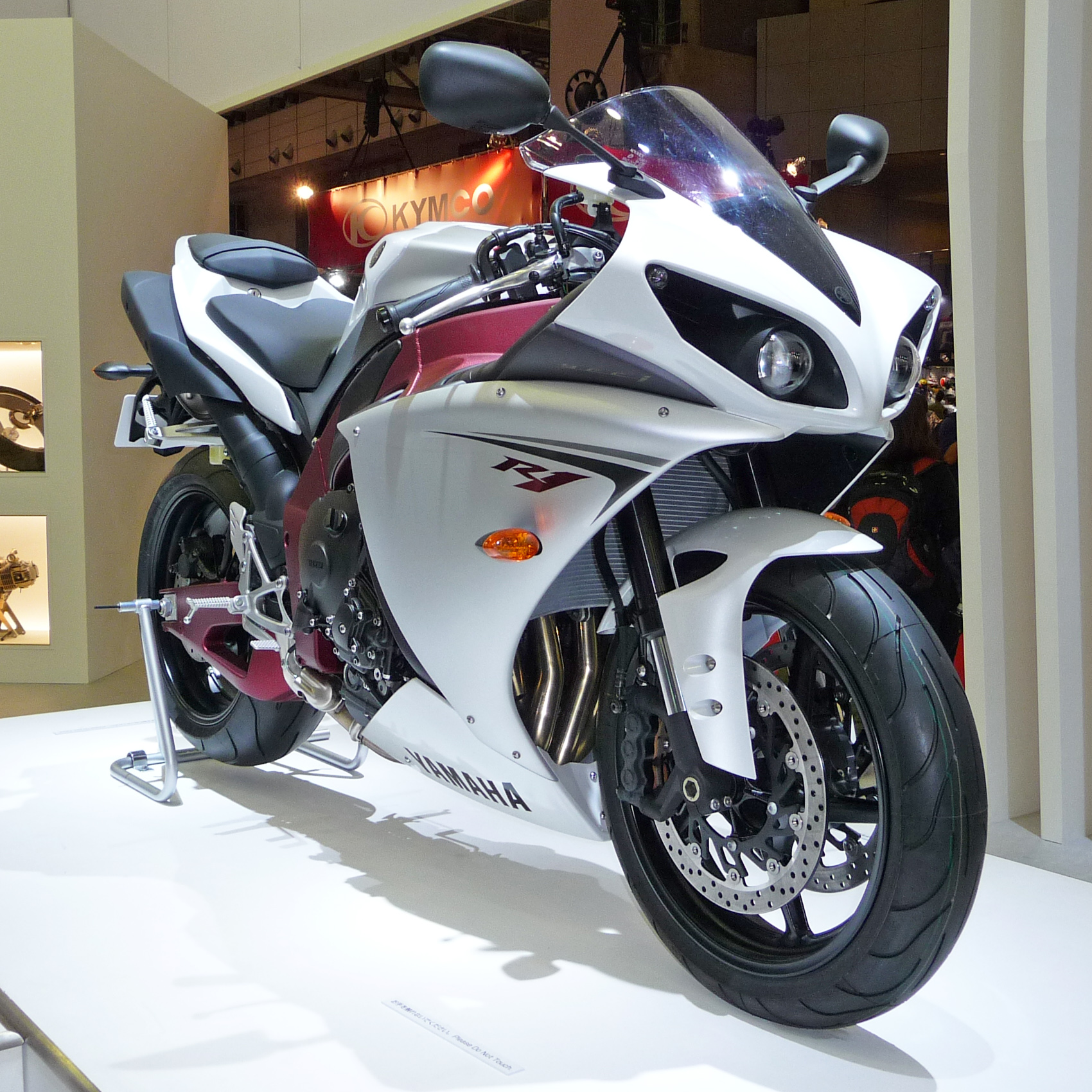 東京モーターショー2009で展示されていたヤマハ・YZF-R1